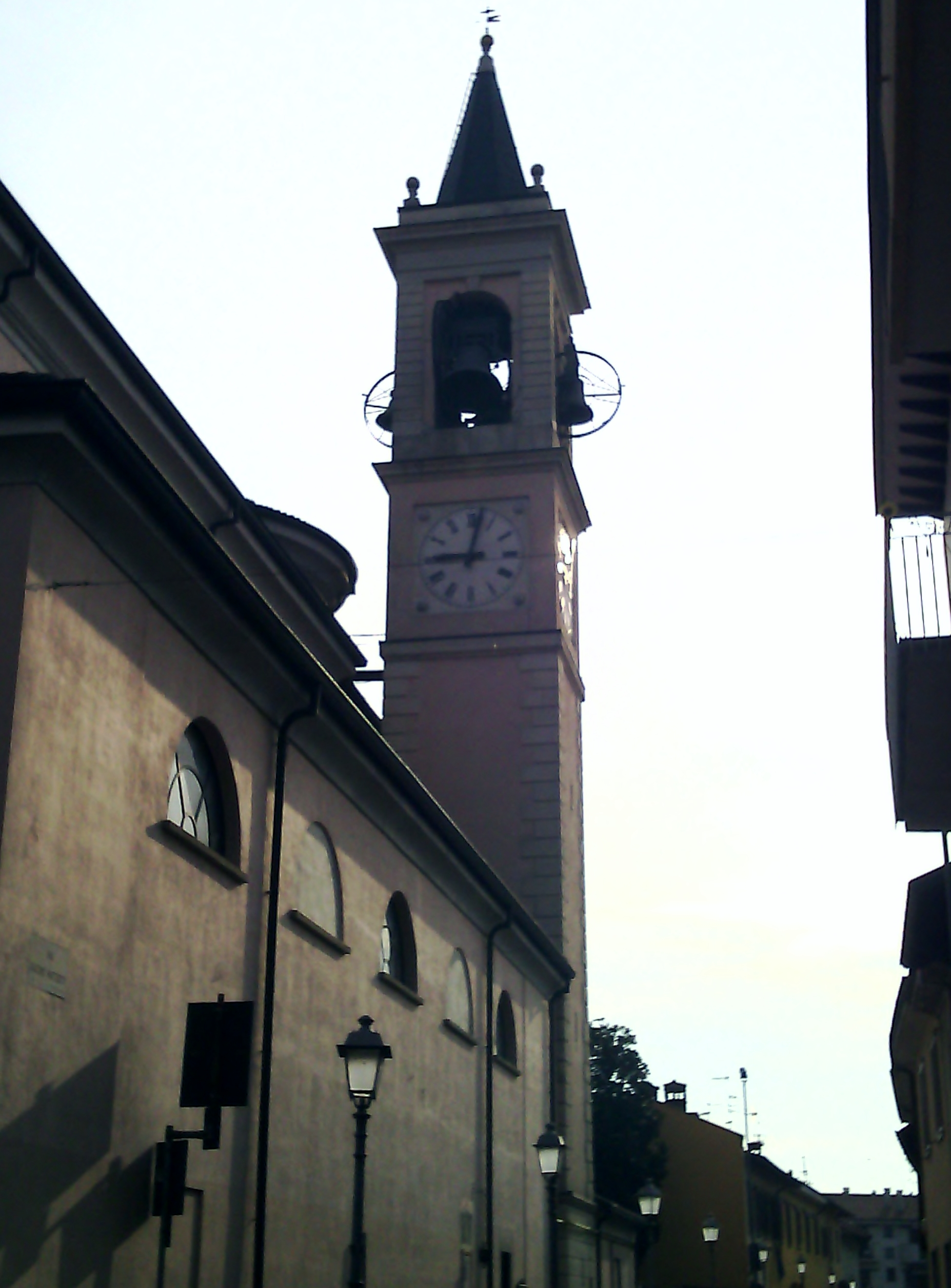 Il campanile della chiesa parrocchiale di Vittuone (MI) - Italy